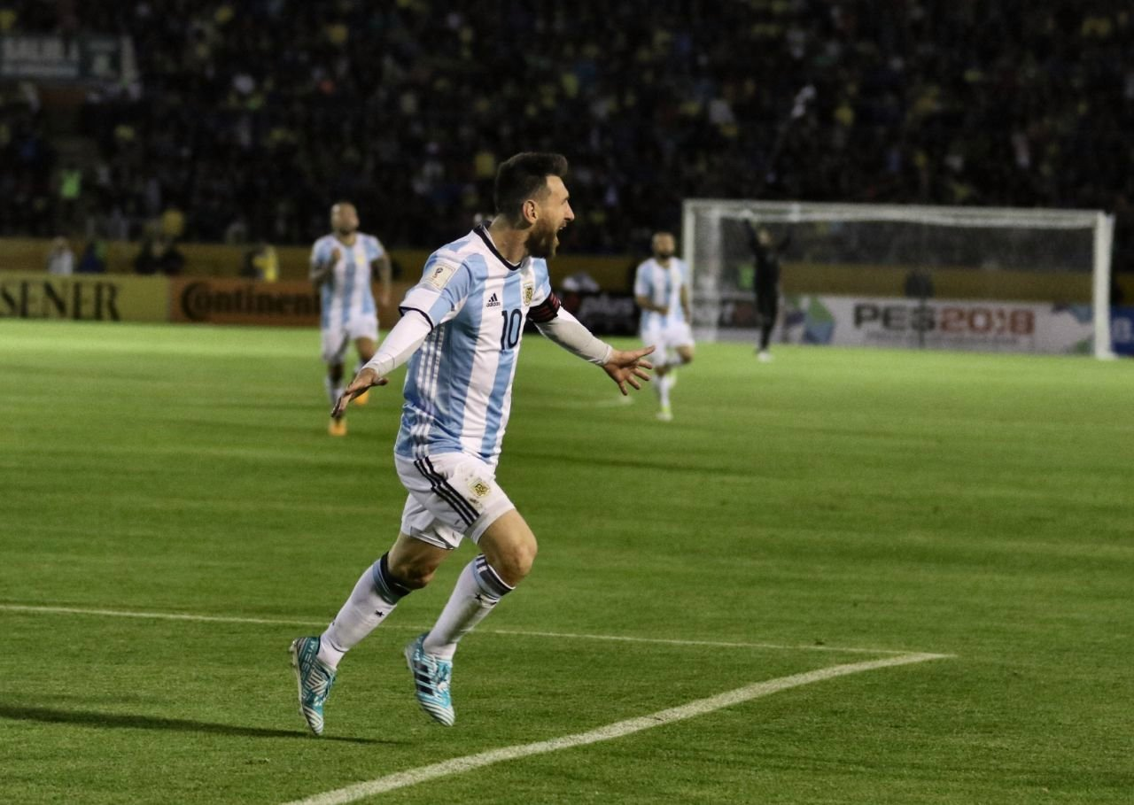 Quito, 10 oct (Andes).- Con tres tantos Argentina espantó los fantasmas de la eliminación, clasificó a su décima octava Copa del Mundo y venció 3-1 a un Ecuador que inició ganando el compromiso, disputado en el estadio Atahualpa de Quito, pero que no supo contener a uno de los mejores jugadores del mundo. ANDES/Micaela Ayala V.